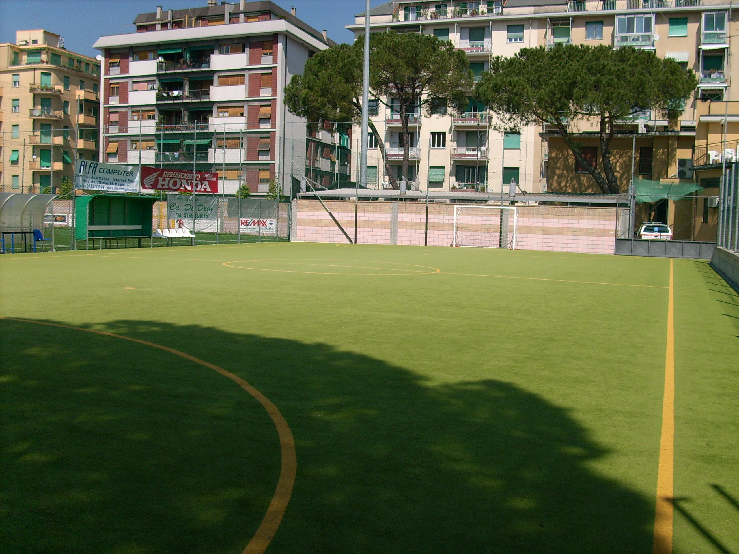 Stadio Comunale Umberto Macera - Calcio a 5